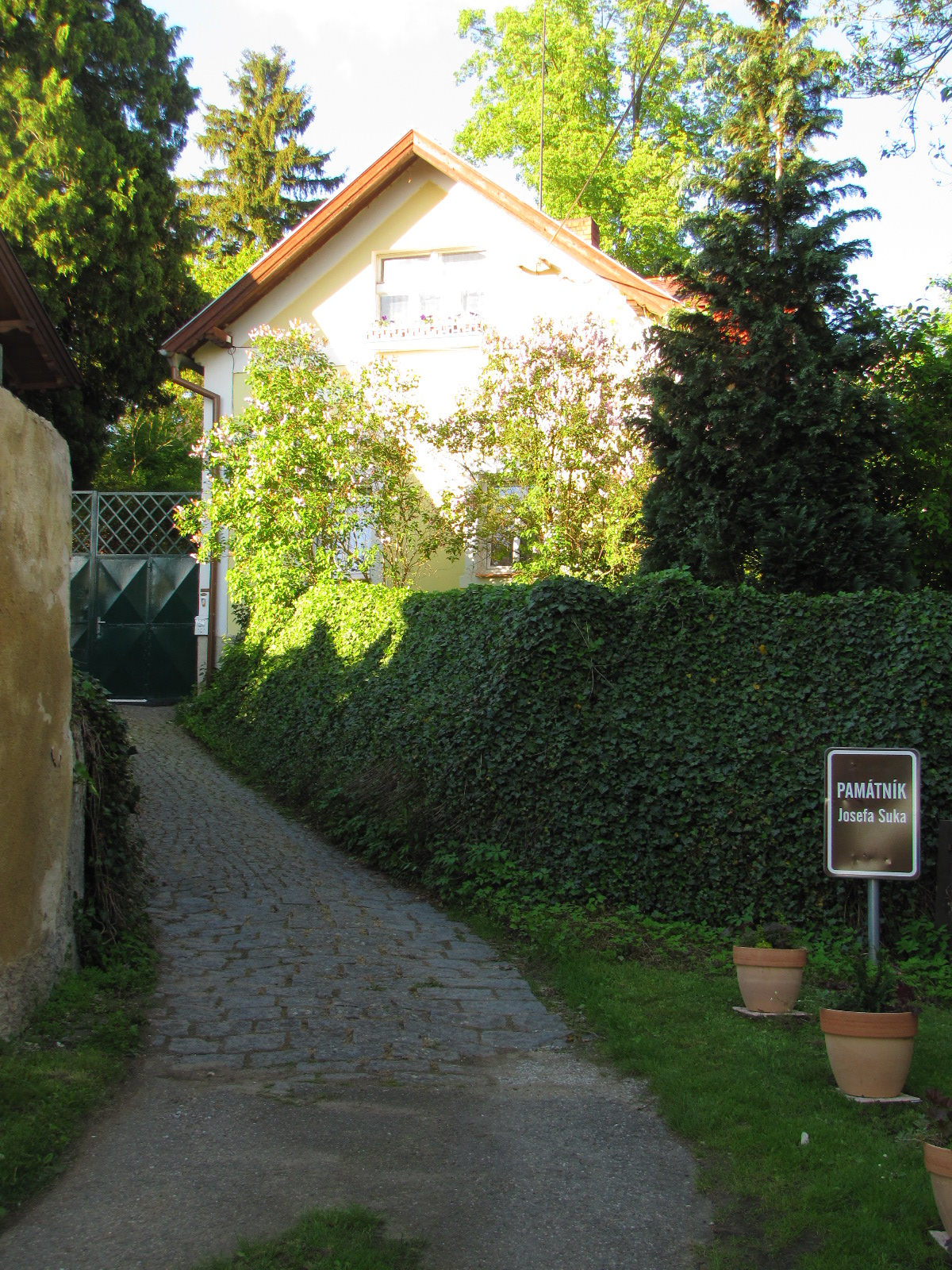 Památník Josefa Suka - Křečovice